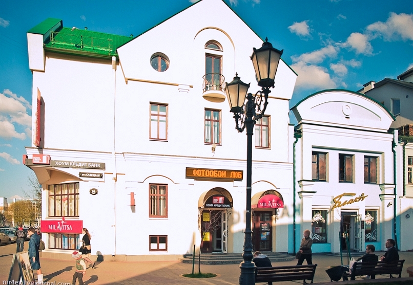 Брэст. Савецкая вуліца